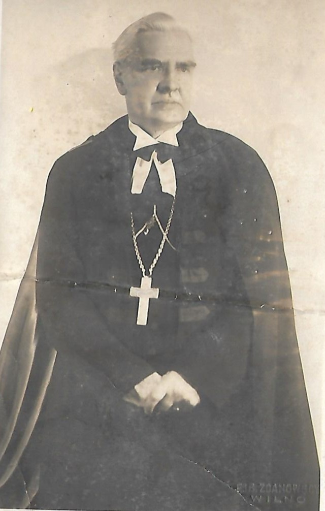 Konstanty Kurnatowski - superintendent Jednoty litewskiej Kościoła Ewangelicko-Reformowanego